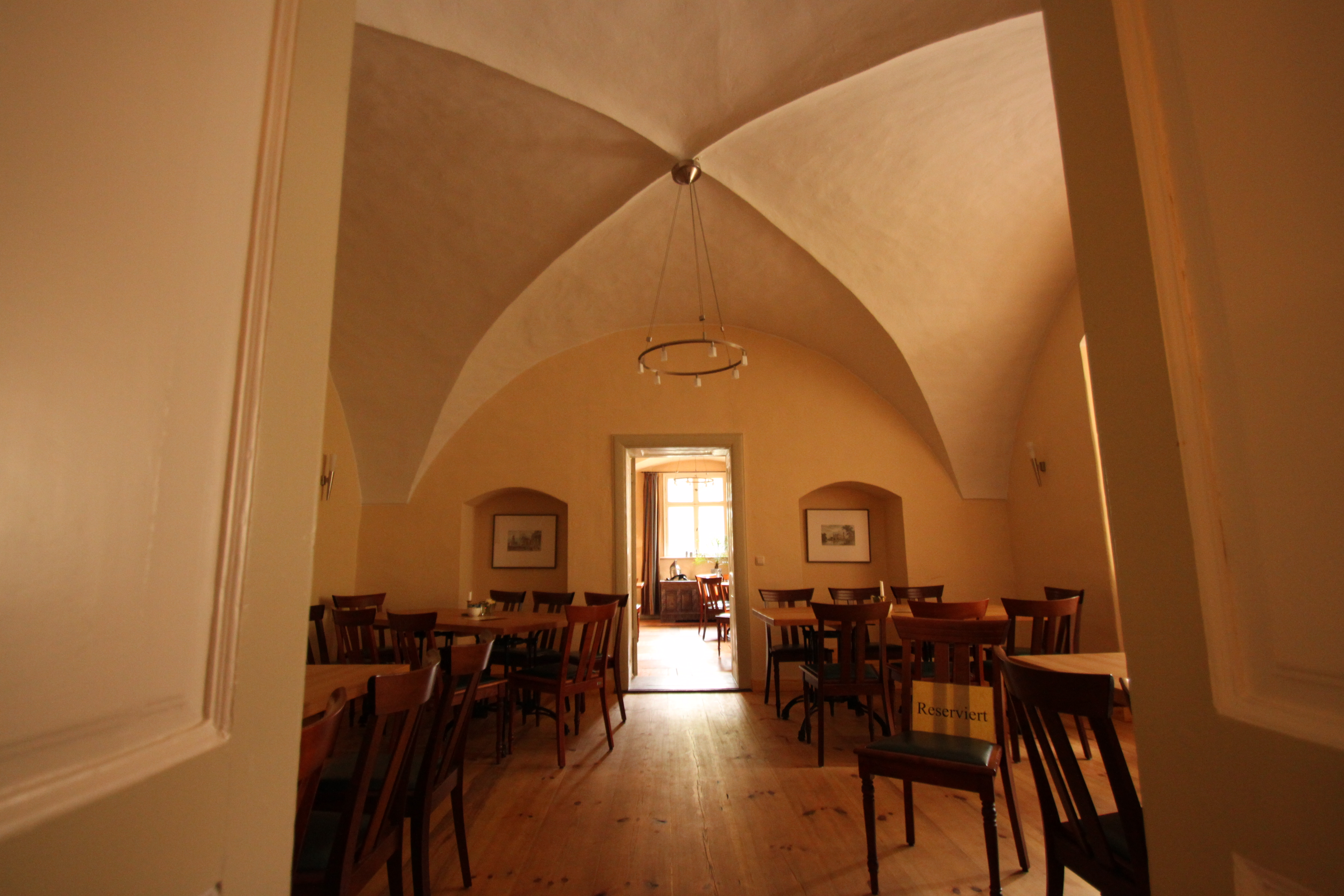 Das Wasserschloss Mellenthin ist ein Herrenhaus in der Gemeinde Mellenthin auf Usedom, es wird heute als Hotel mit Gastronomie, Kaffeerösterei und Brauerei genutzt. Saal im Hauptgebäude.